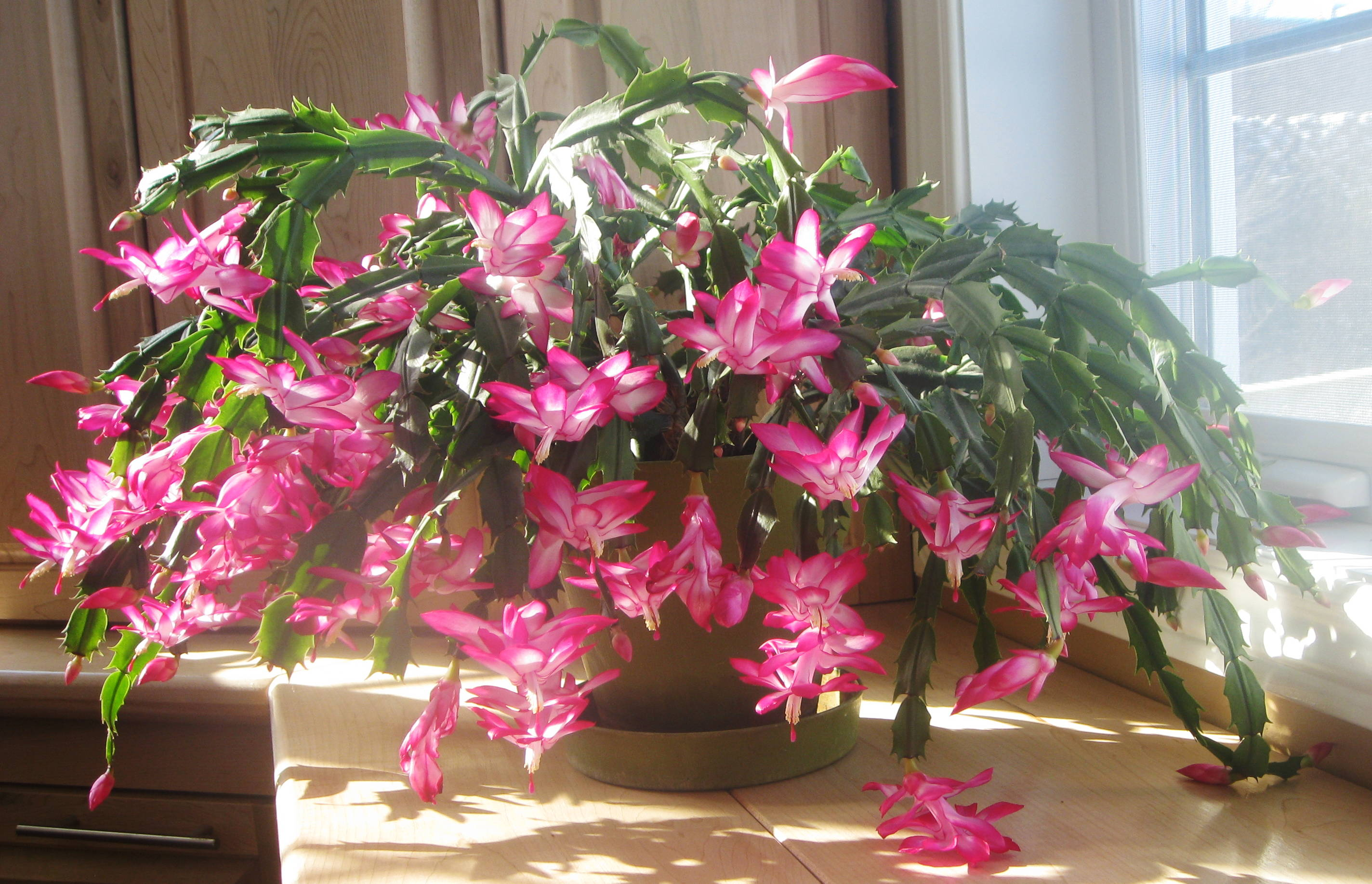 Photo d'un cactus de noël en pleine floraison.